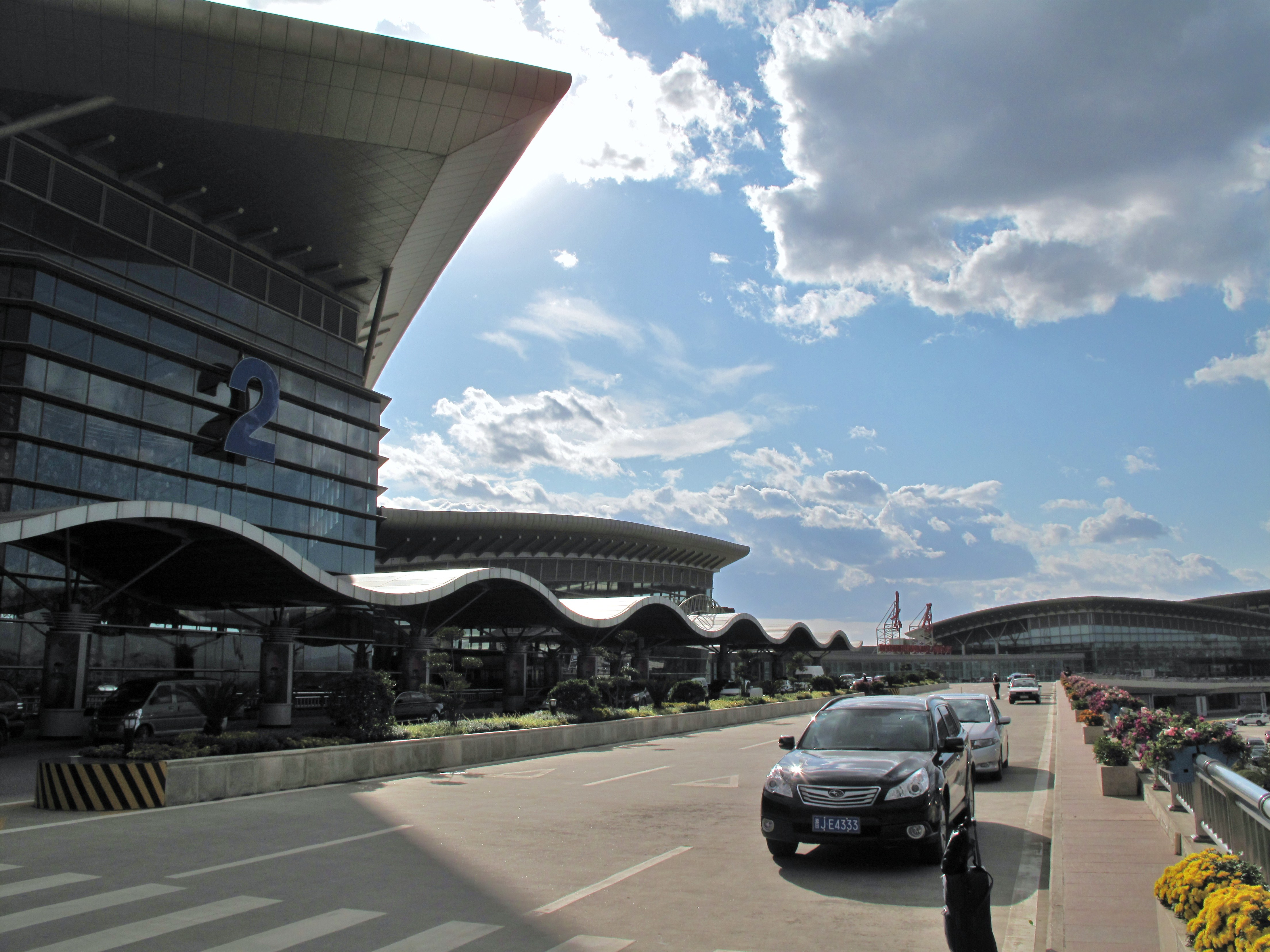 Taiyuan airport